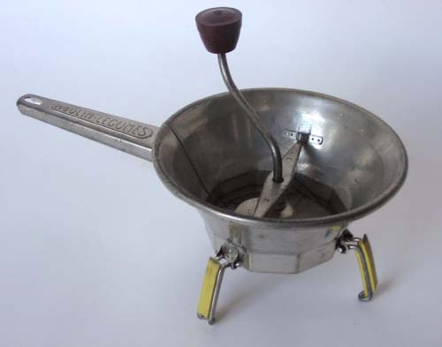 Moulinette Moulin Légume